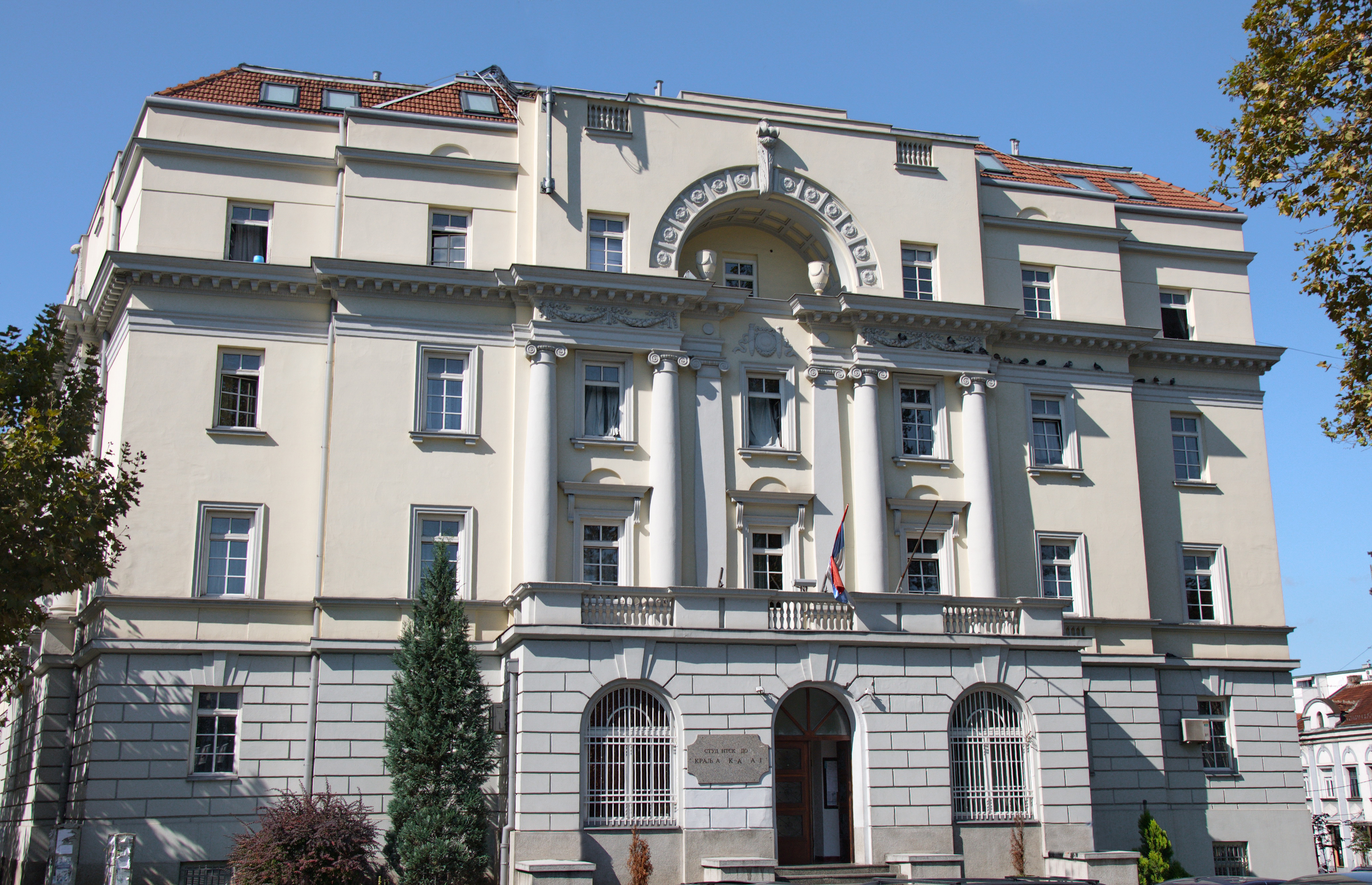 Srpski (latinica): Studentski dom kralj Aleksandar I u Beogradu se nalazi u Bulevaru kralja Aleksandra 75. Studentski dom kralj Aleksandar I je sagrađen 1927-1928. godine, prema projektu ruskog arhitekte Georgija Pavloviča Kovaljevskog, za studente Beogradskog univerziteta. Glavna fasada istaknuta ulaznom stepenišnom partijom i balkonom prvog sprata okrenuta je ka raskrsnici Ulice kraljice Marije i Bulevara kralja Aleksandra. Koncipiran je kao slobodnostojeći objekat razuđene osnove trapezoidnog oblika koji u silueti ostvaruje masivnu kubusnu formu.